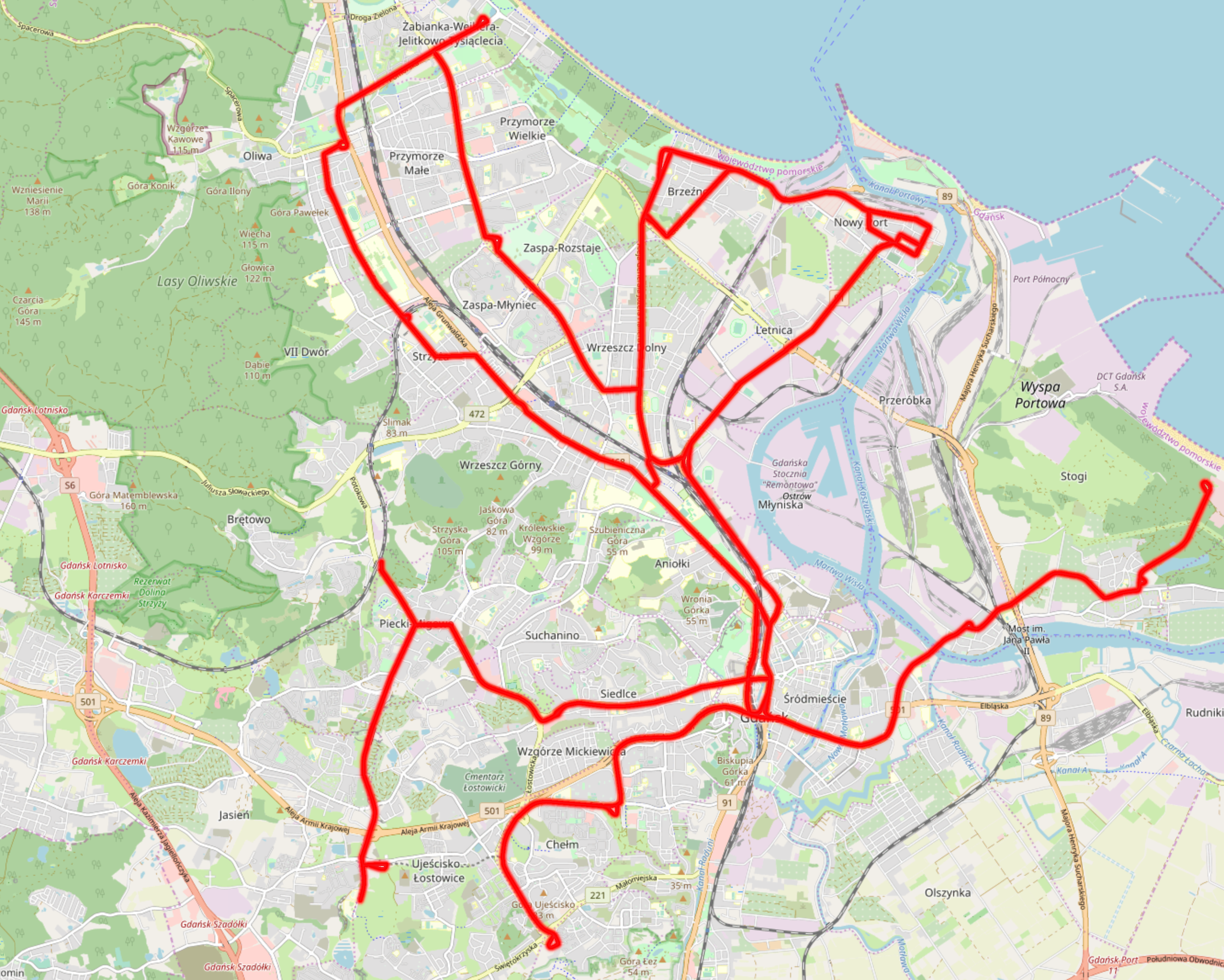 schemat sieci tramwajowej w Gdańsku- stan na czerwiec 2020; utworzony za pomocą narzędzi